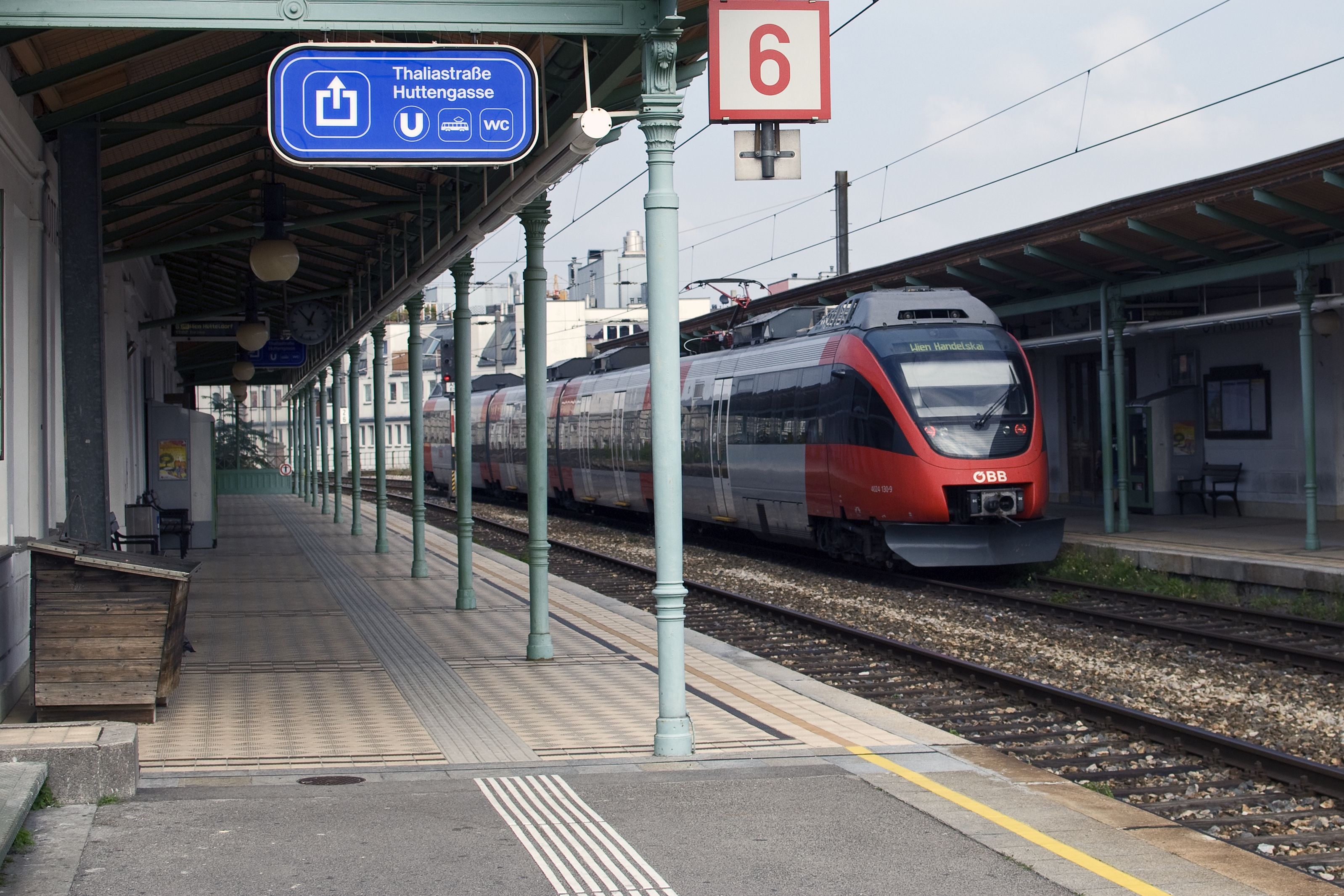 Eisenbahnstrecke, Wiener Vorortelinie - Station Ottakring